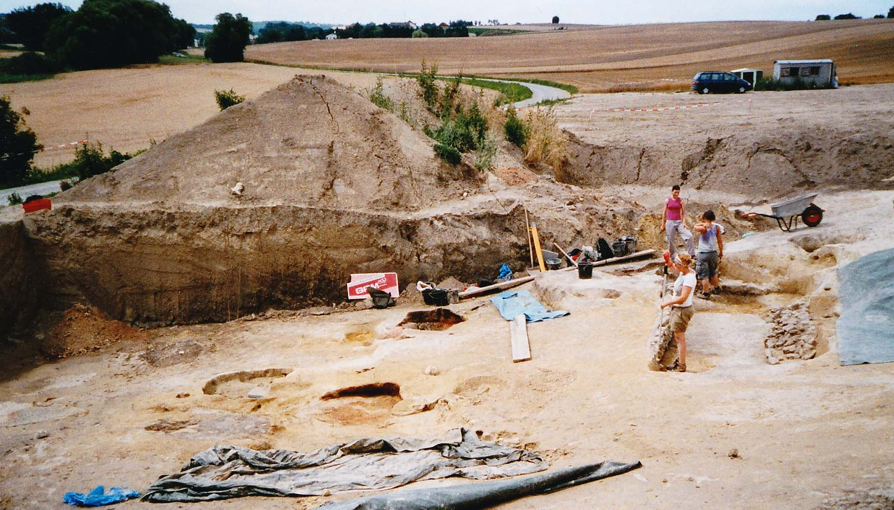 Archäologische Ausgrabungsarbeiten bei Gaweinstal 2005